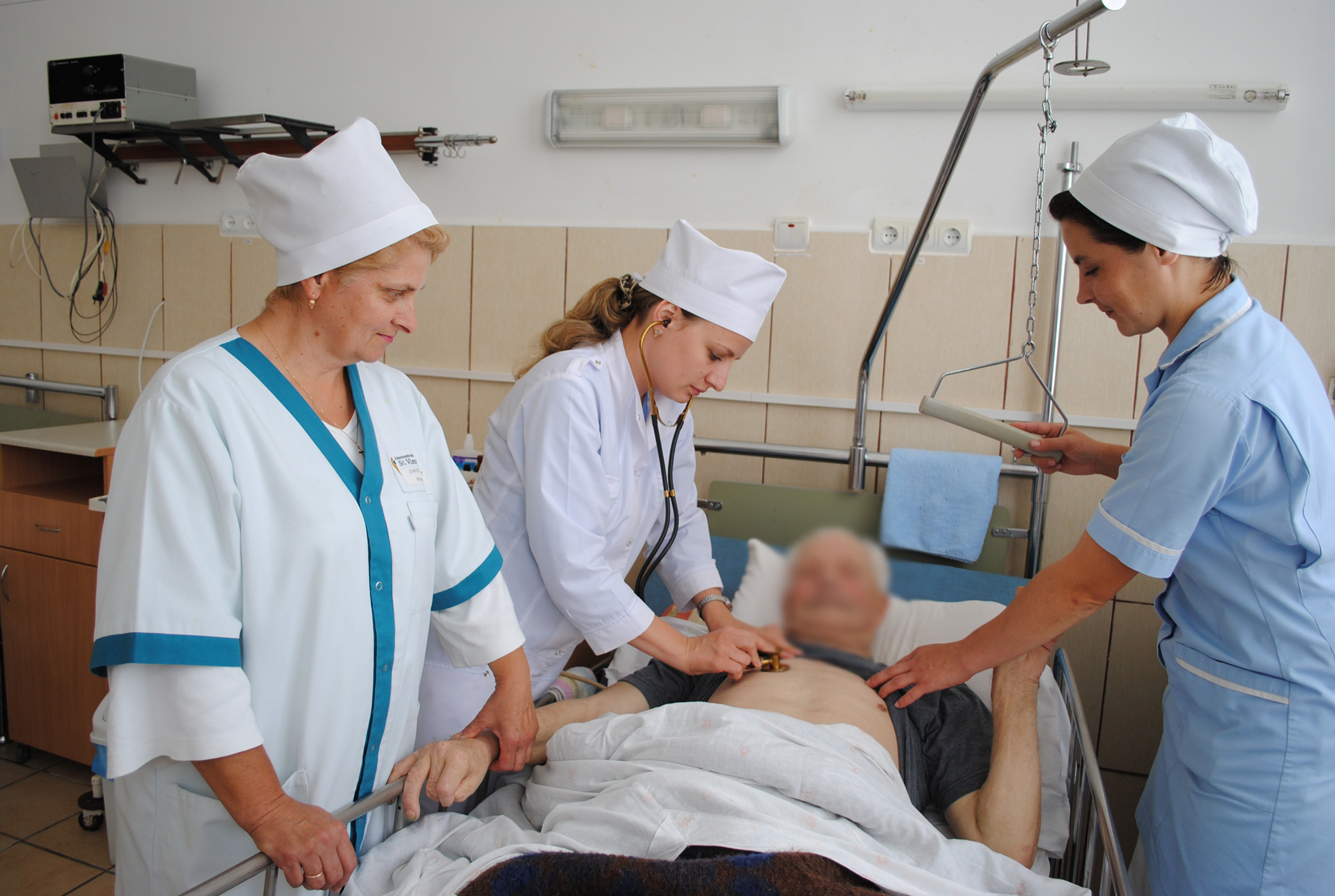 Обстеження пацієнта в Бережанській центральній районній клінічній лікарні.